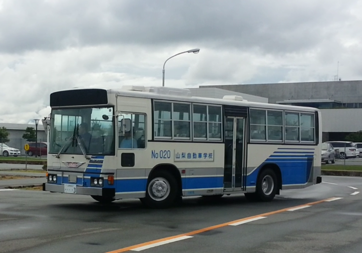 日野ブルーリボンの中型二種教習車。旧制の大型二種教習車